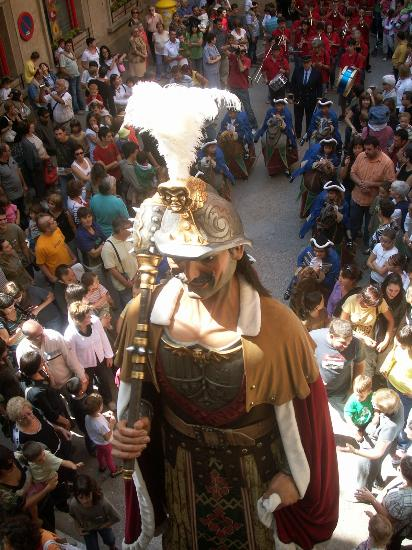 El Gegant Vell de Solsona durant el passacarrers del pregó de la festa de l'any 2008.